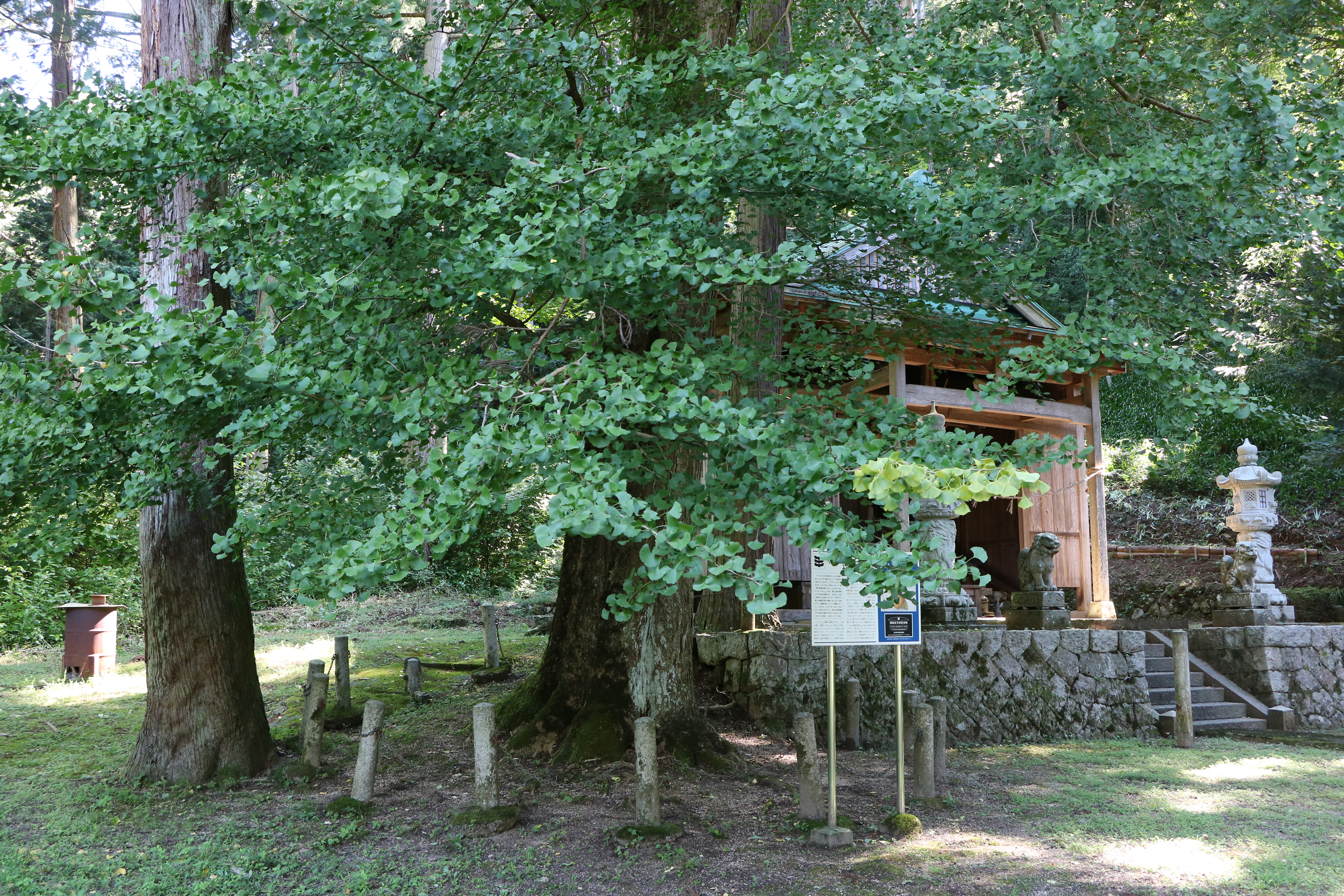 杉森神社のオハツキイチョウ西側の株（国指定天然記念物、福井県大飯郡高浜町）